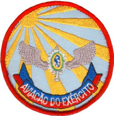 Bolacha da Aviação do Exército